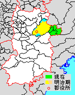 奈良県宇陀郡の位置